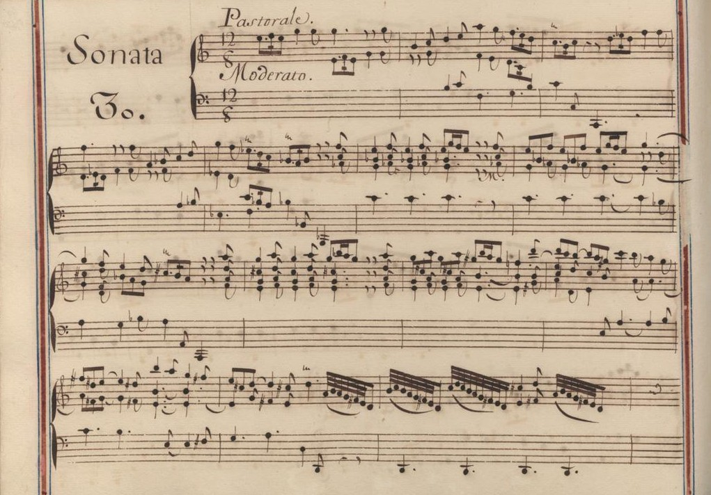 La sonate K. 513, telle qu'elle se présente dans le manuscrit de Venise, volume XII no. 30.